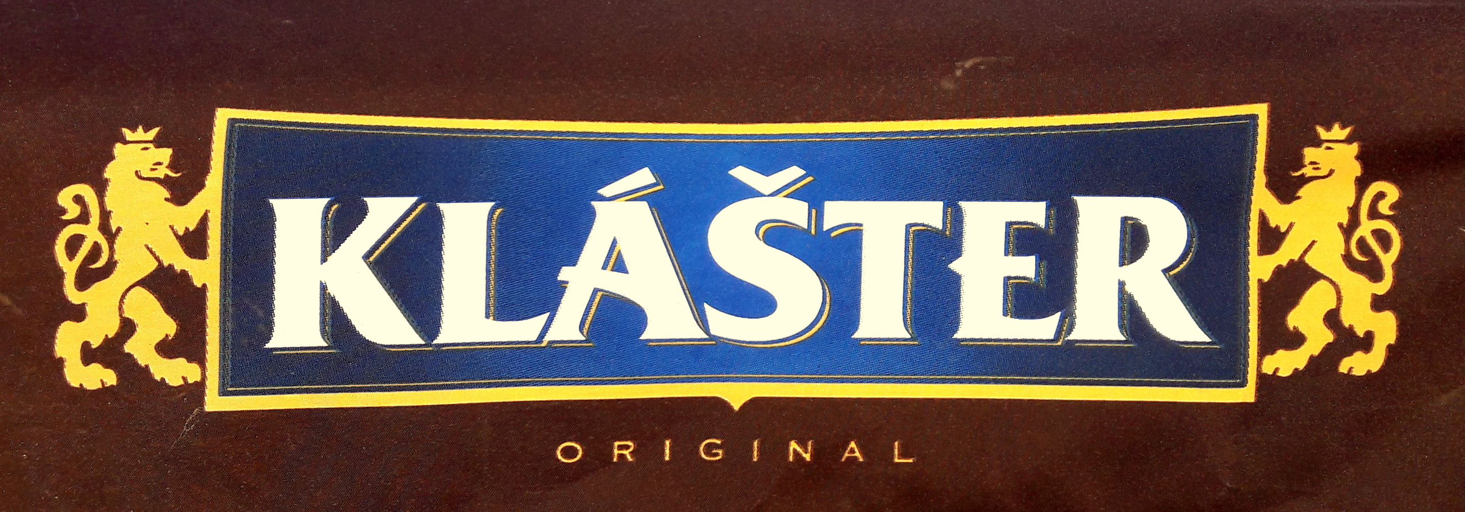 Pivovar Klášter logo